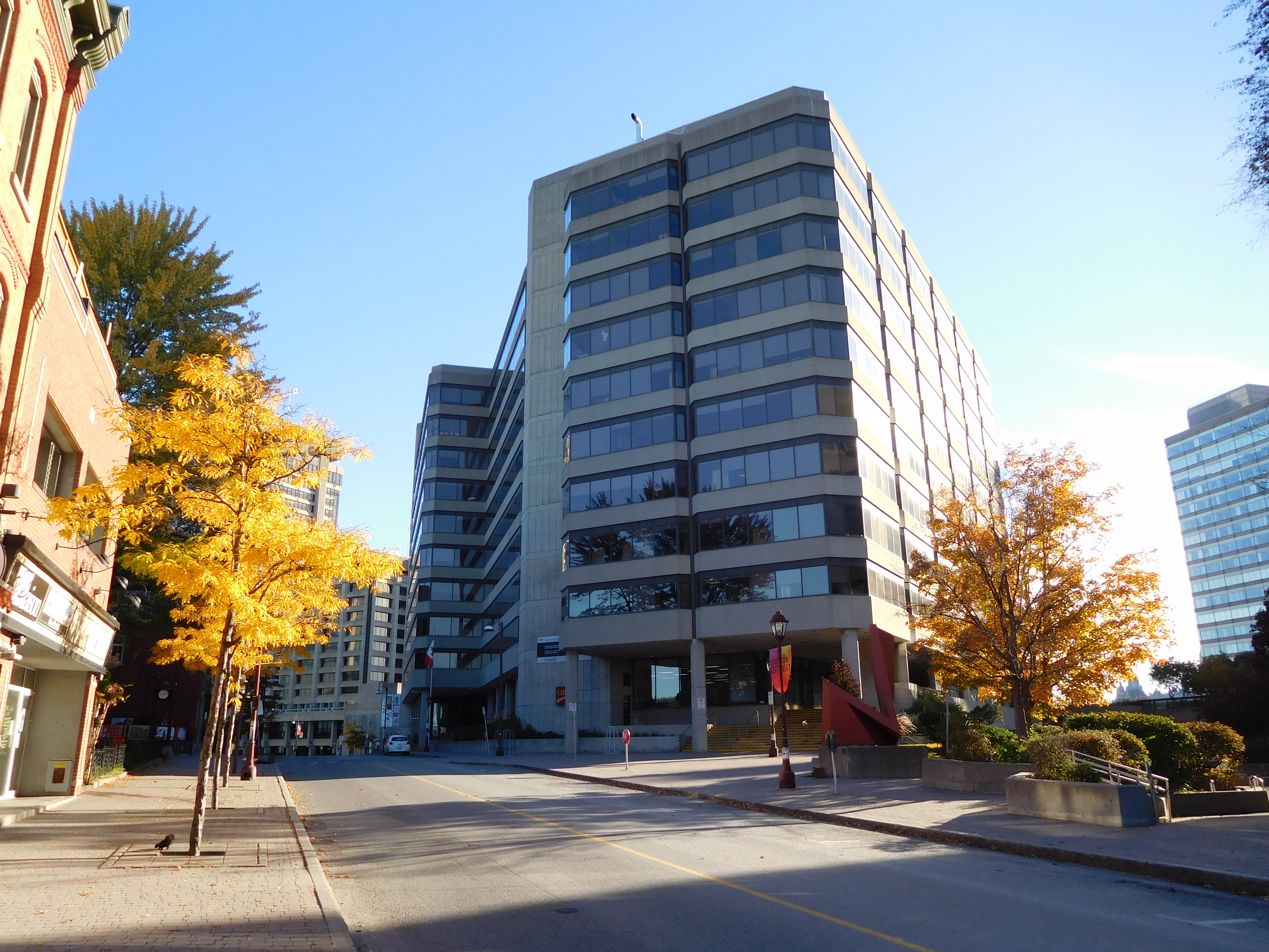 Place du Centre, 200, promenade du Portage, secteur de Hull, Gatineau